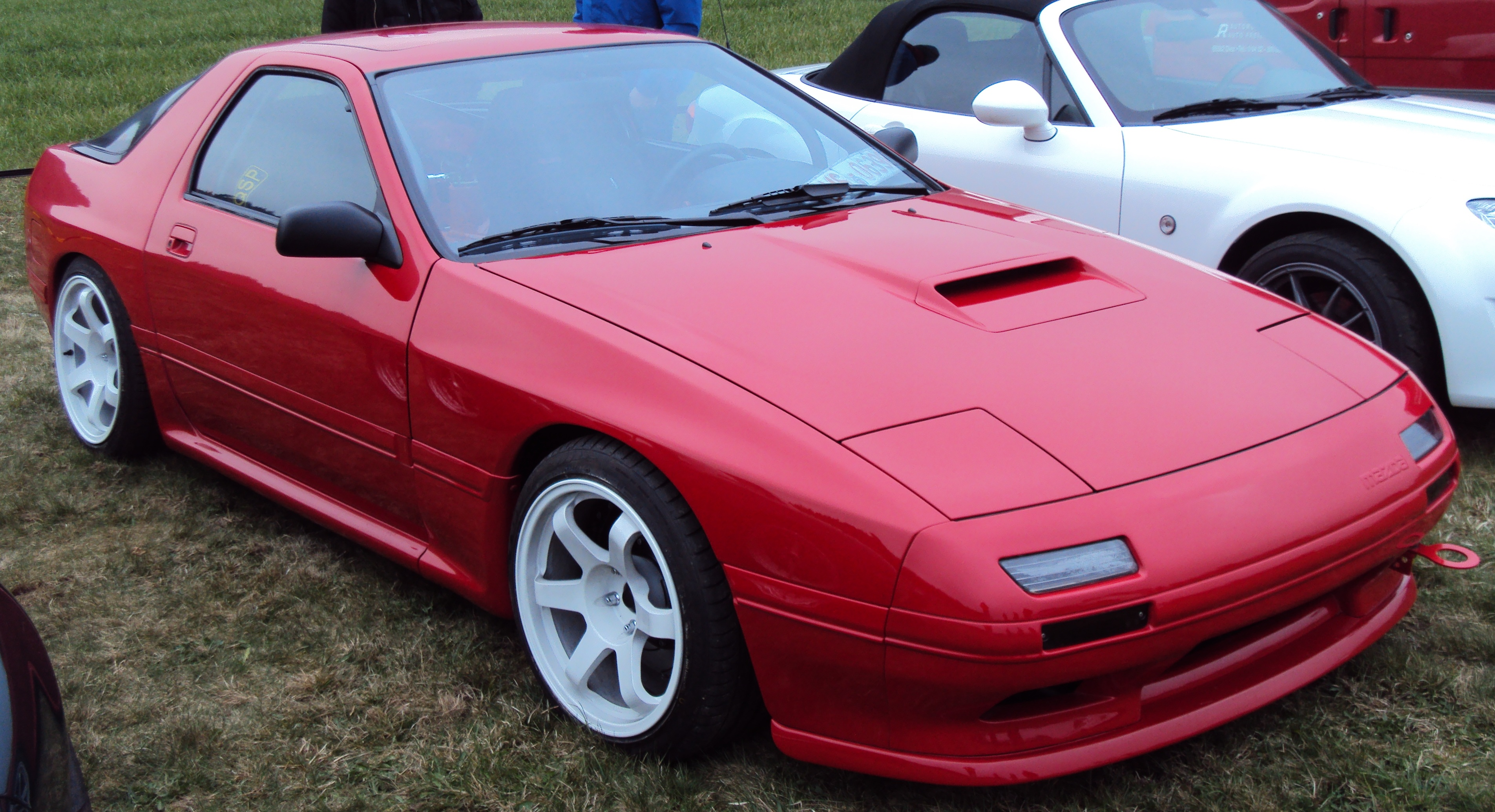 Modifizierter Mazda RX-7 FC.